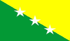 Bandera de El Empalme